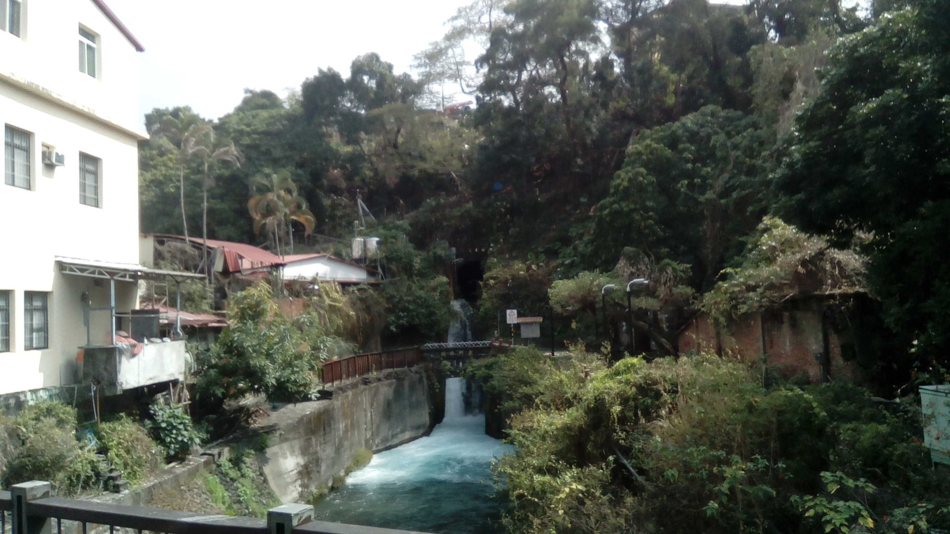 位於內埔水門村 是當地灌溉的自來水源地